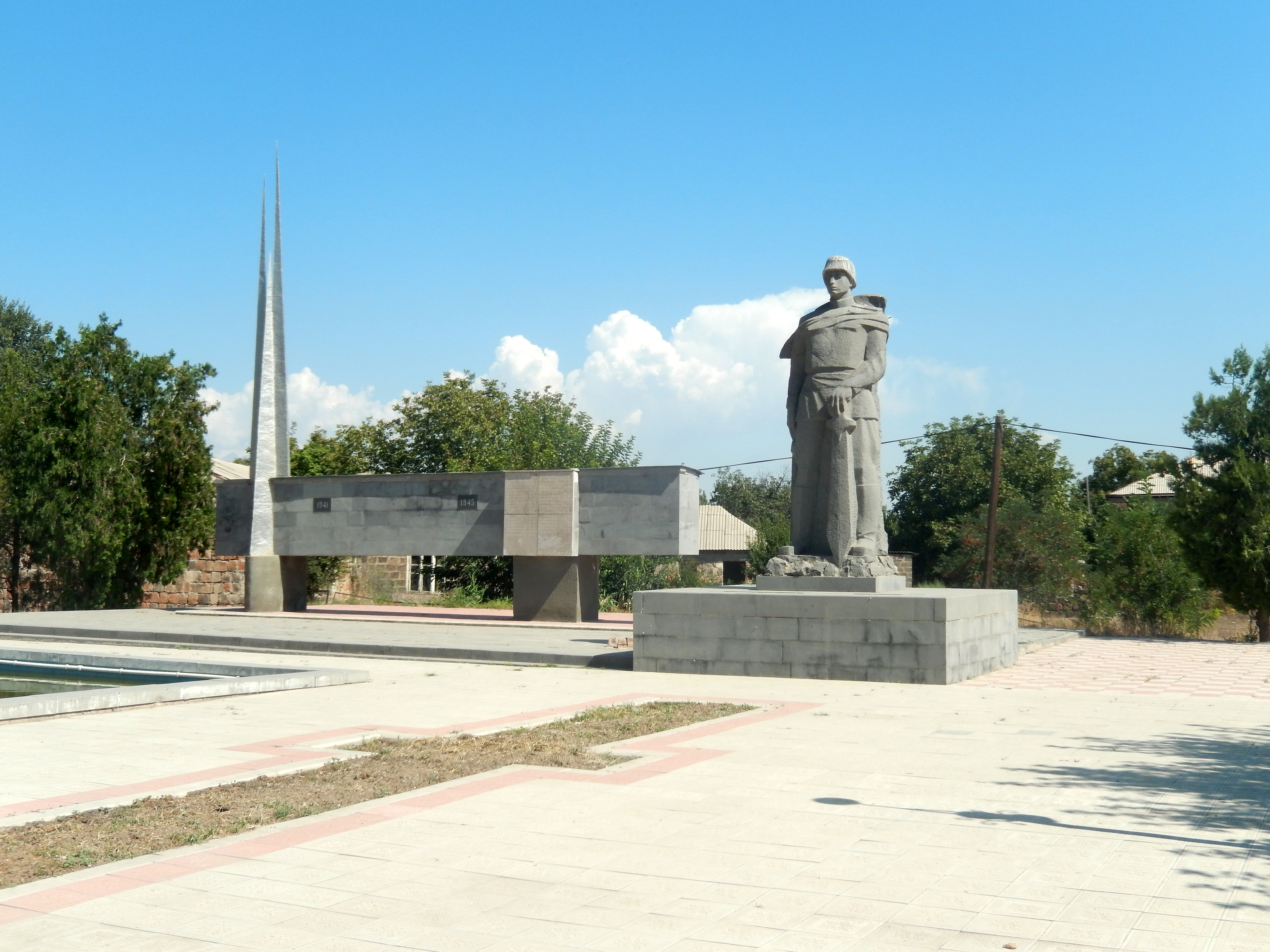 Հուշարձան Երկրորդ աշխարհամարտում զոհվածների, Հայկավան 57/2